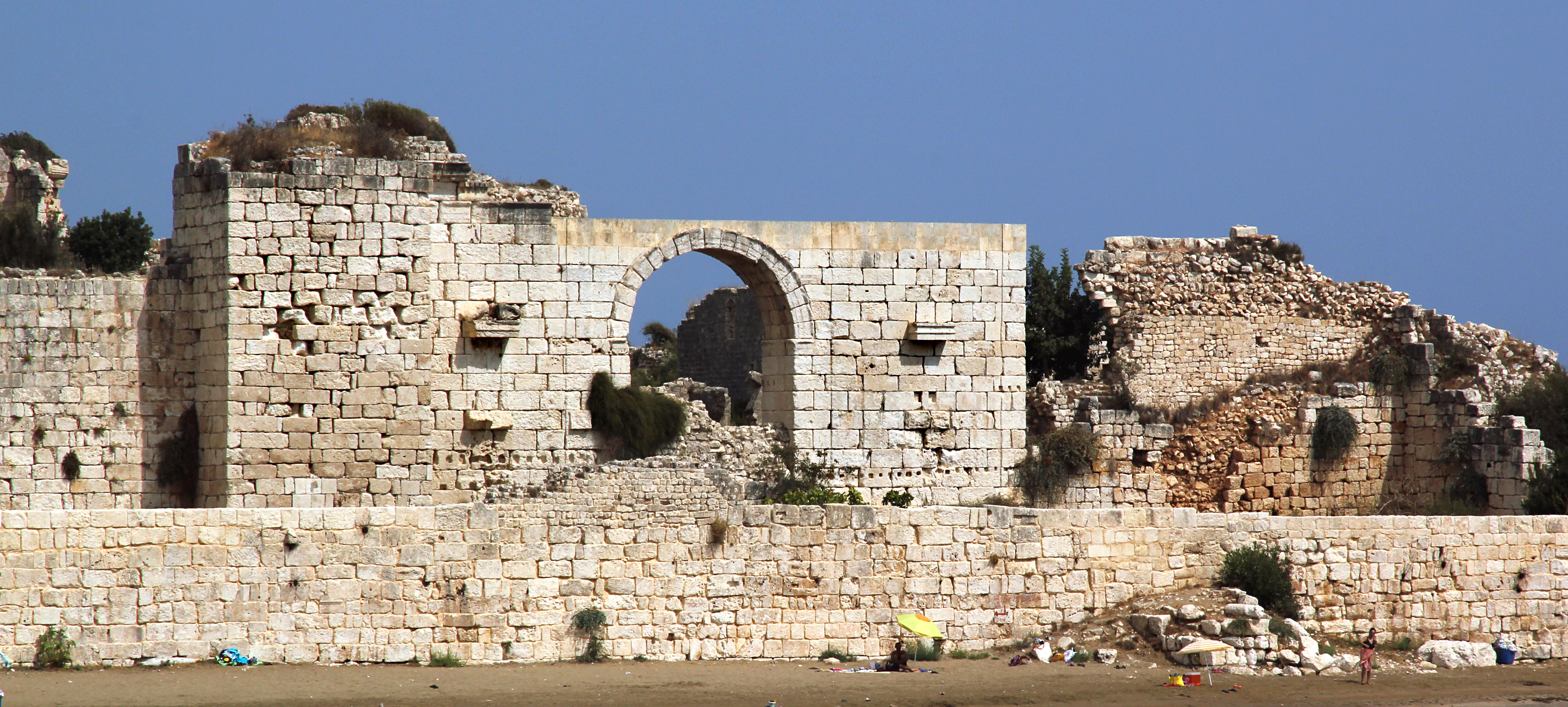 Korykos, römisches Prunktor der Landburg bei Kızkalesi, Südtürkei, Ansicht von Westen